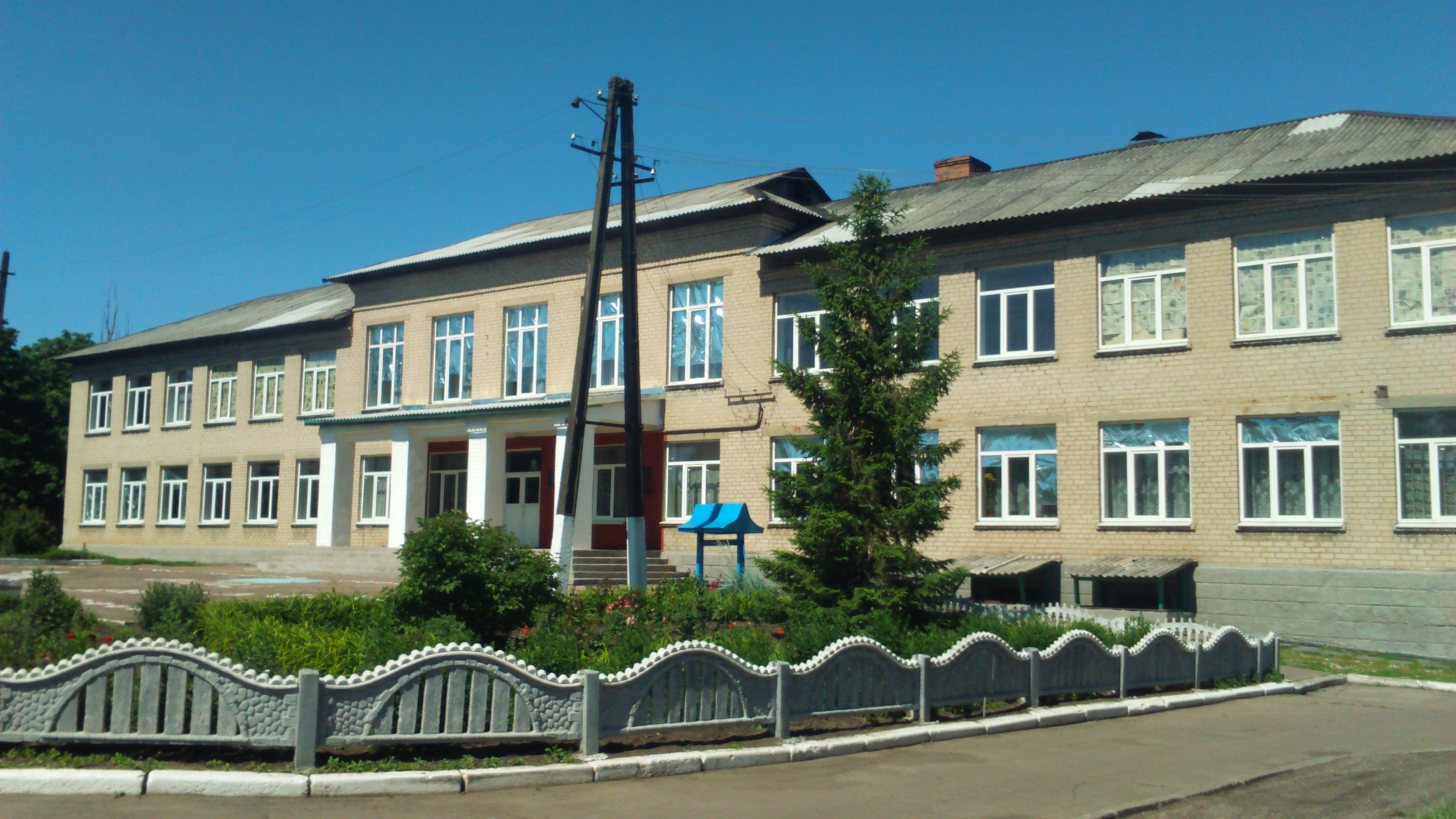 Світле — селище в Україні, Добропільському районі Донецької області, над річкою Водяна.